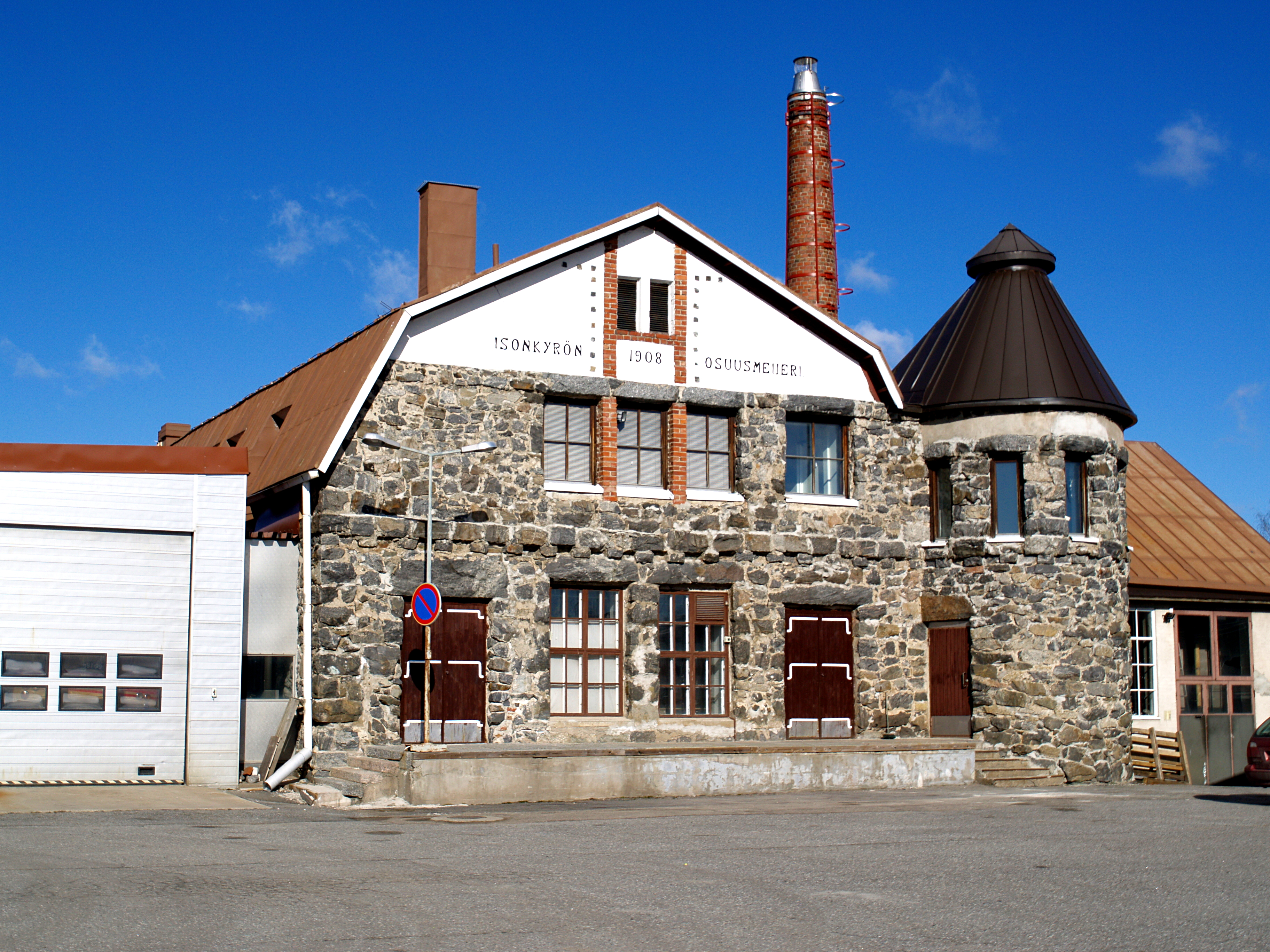 Kyrönmaan osuusmeijeri maaliskuussa 2015.